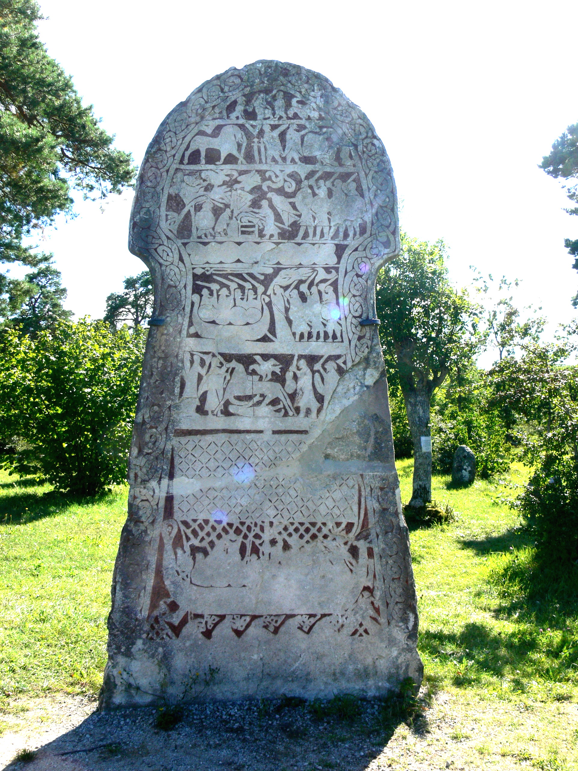 Bunge Museum auf Gotland. Wikinger-Bildstein